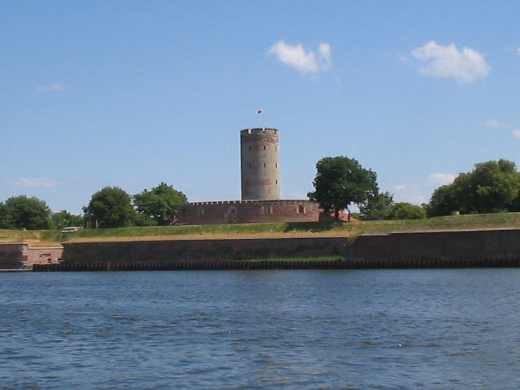 Twierdza Wisłoujście, Gdansk, Poland